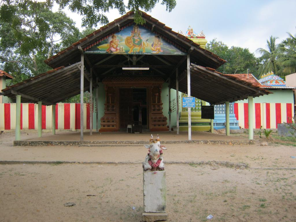 கச்சாய் கண்ணகி அம்மன் கோவில்